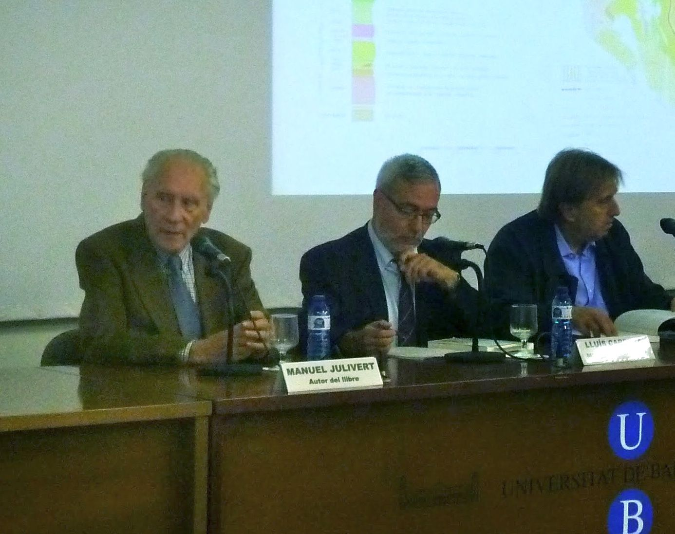 Acte de presentació d'un llibre de Manuel Julivert a la Universitat de Barcelona